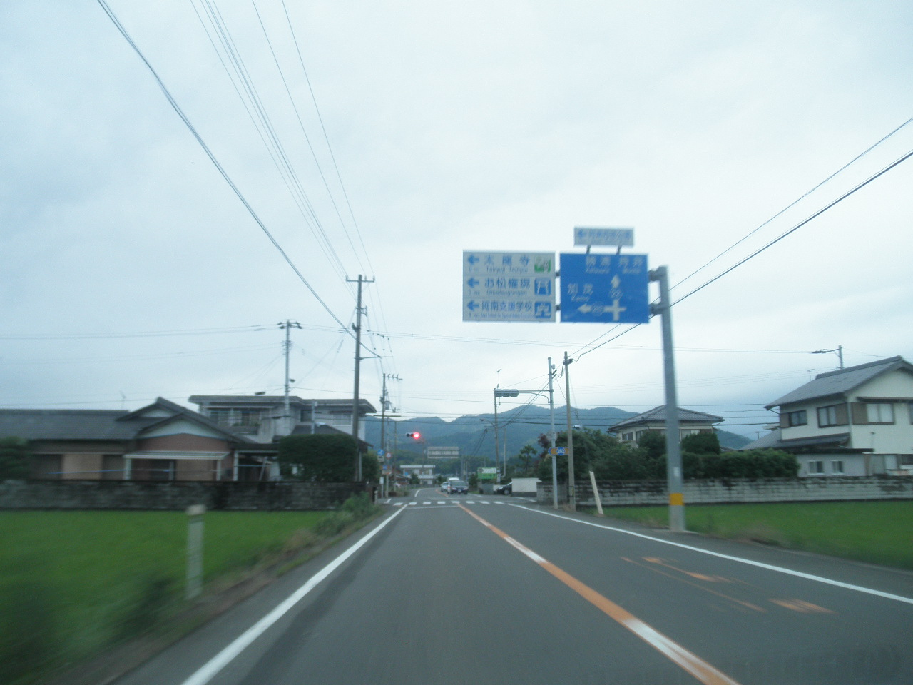 徳島県阿南市中大野町北傍示 徳島県道22号阿南勝浦線